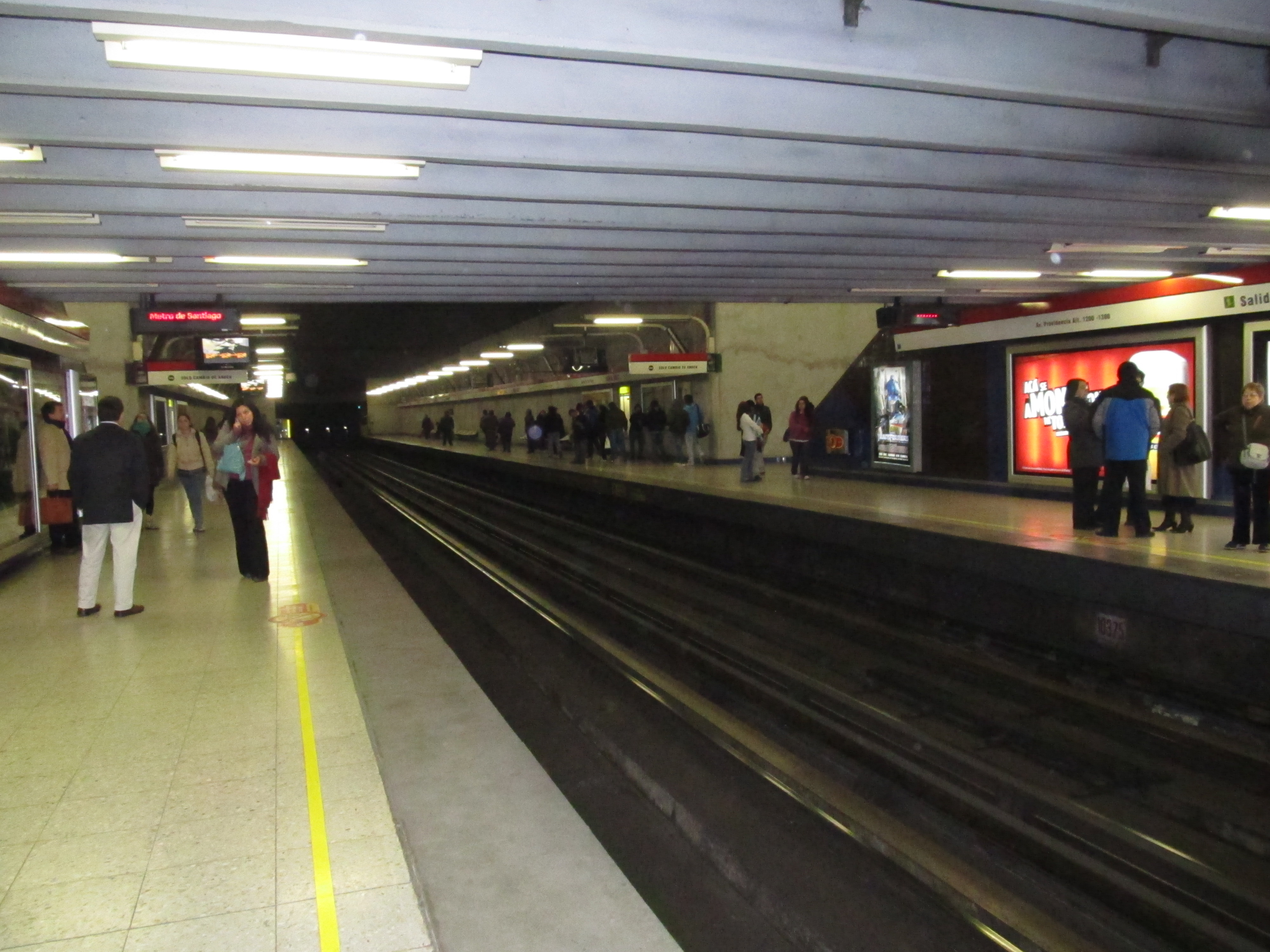 Estación Manuel Montt del Metro de Santiago.